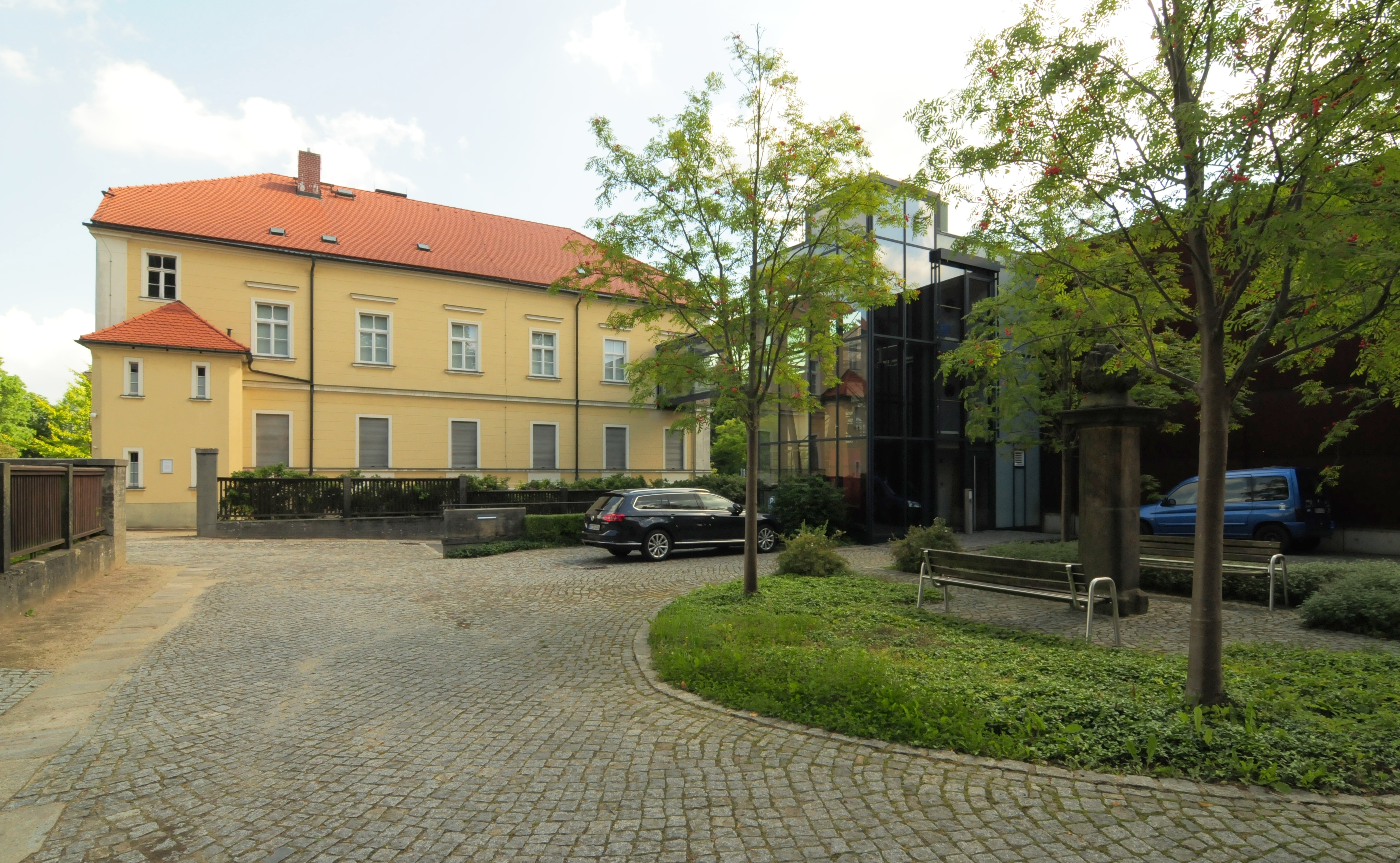 Herrnhut, Unitätsarchiv Alt- und Neubau (Landkreis Görlitz, Sachsen, Deutschland)